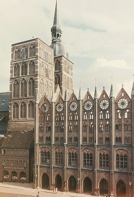 Original image description from the Deutsche Fotothek Stralsund. Rathaus und St.-Nikolai-Kirche am Alten Markt